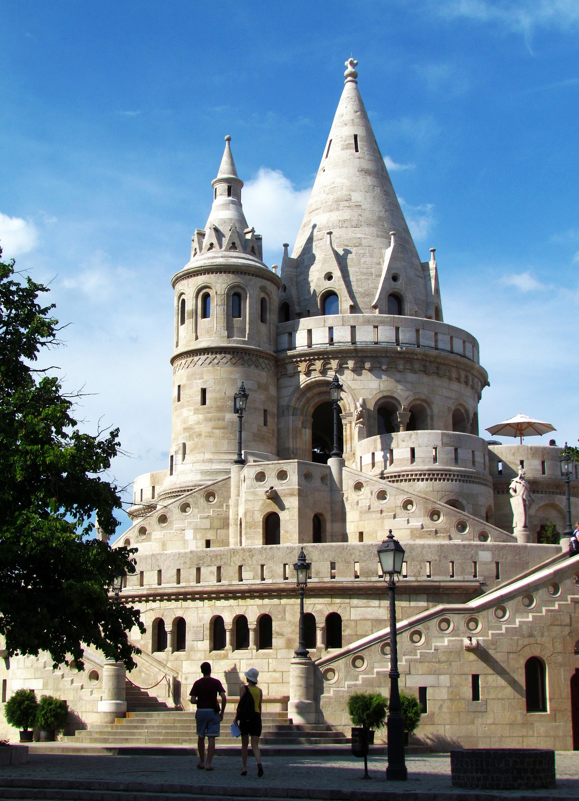 Halászbástya épülete díszlépcsővel (Budapest 1, Halászbástya) This is a photo of a monument in Hungary, Identifier: 103